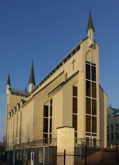 Храм на подолі в місті Київі